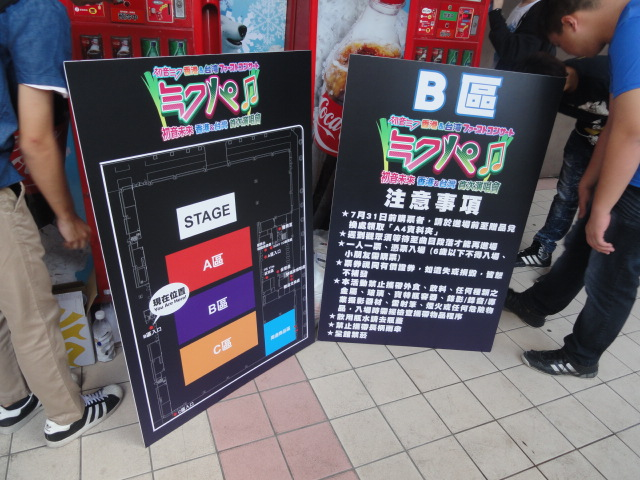 2012年10月6日“初音未来香港＆台湾首次演唱会 “MIKUPA♪””台湾14:00场B区排队等候处